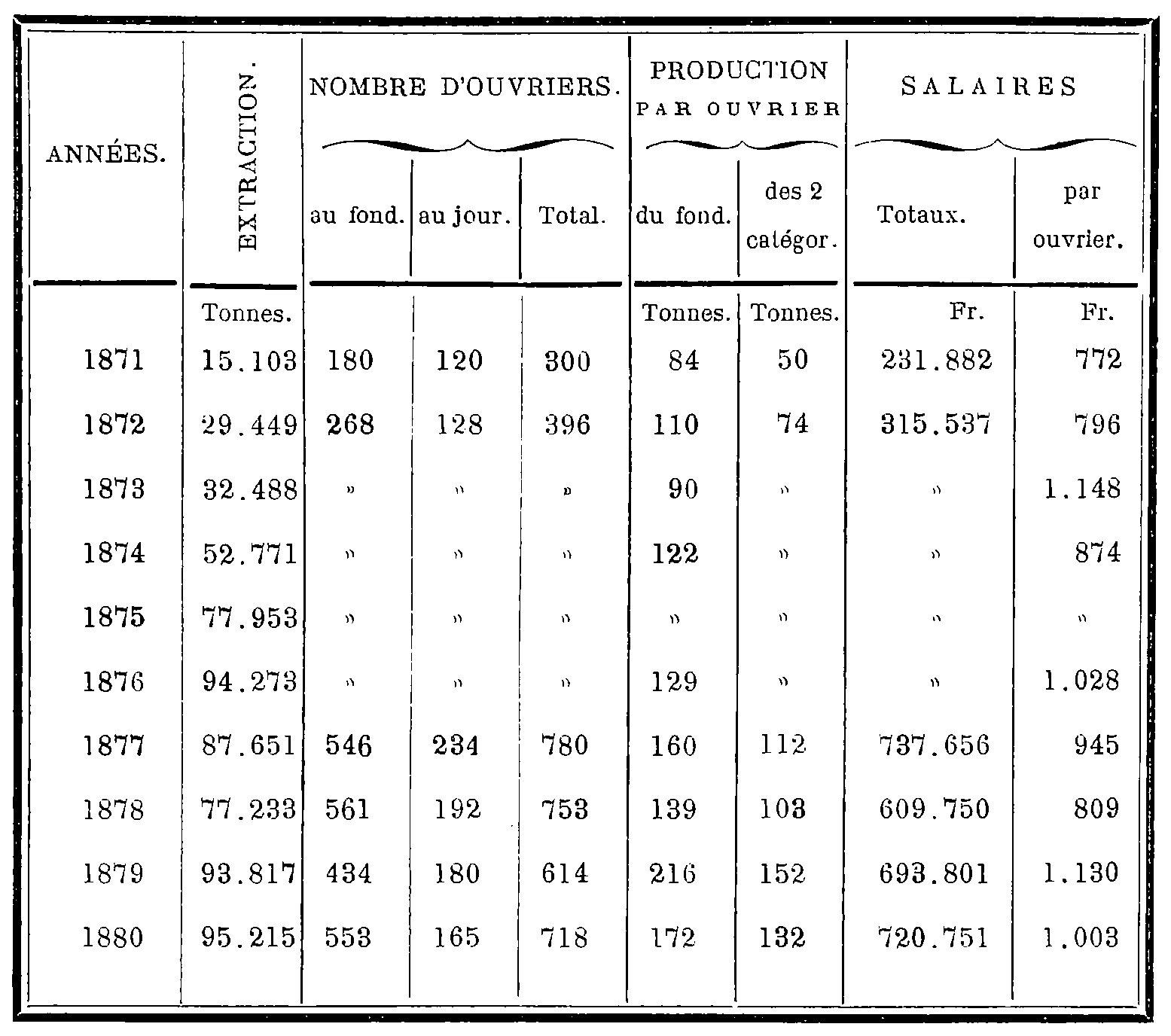 Ouvriers, rendement et salaires de la Compagnie des Charbonnages de Réty, Ferques et Hardinghen de 1871 à 1880.